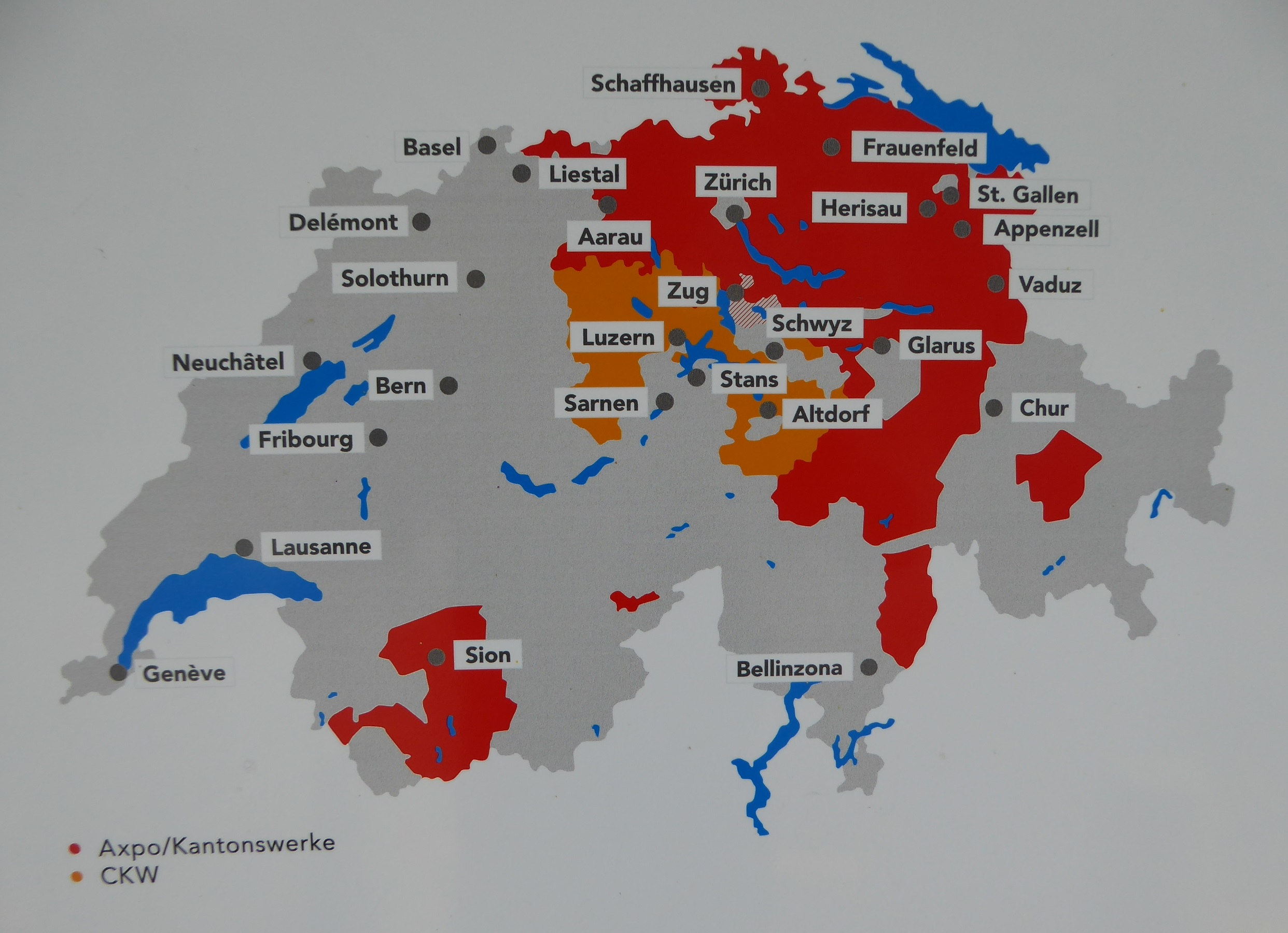 Geschäftsgebiet der Axpo AG und der Centralschweizerischen Kraftwerke (CKW), einer Tochterunternehmung der Axpo